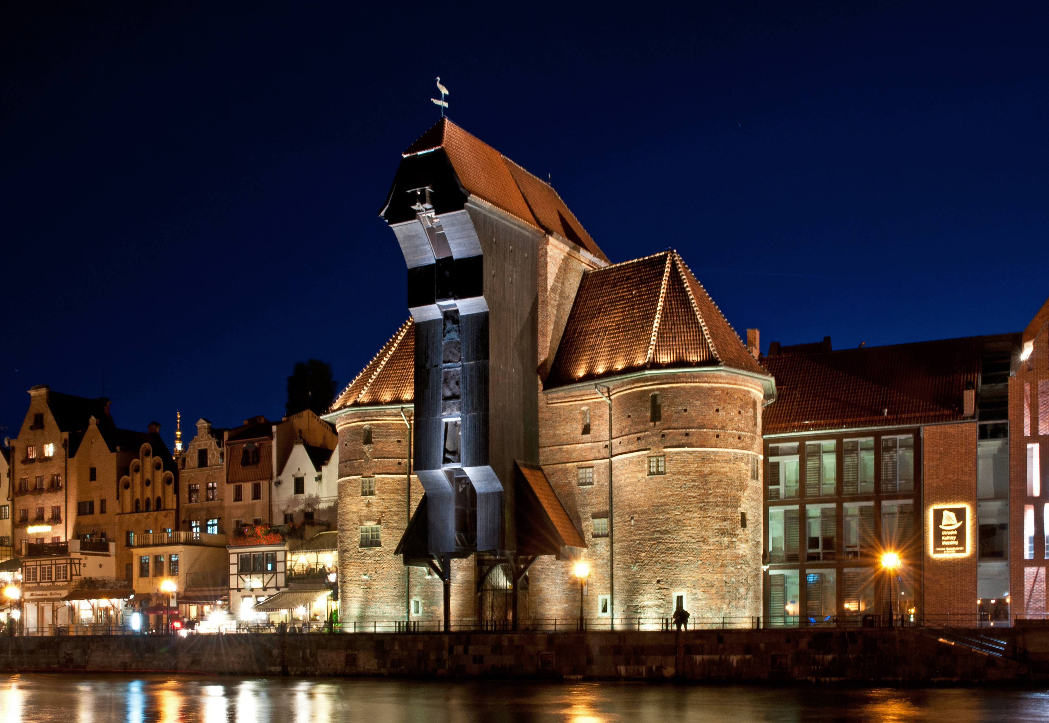 Gdańsk Główne Miasto - Brama Żuraw, XIV, XVII (widok od Motławy)